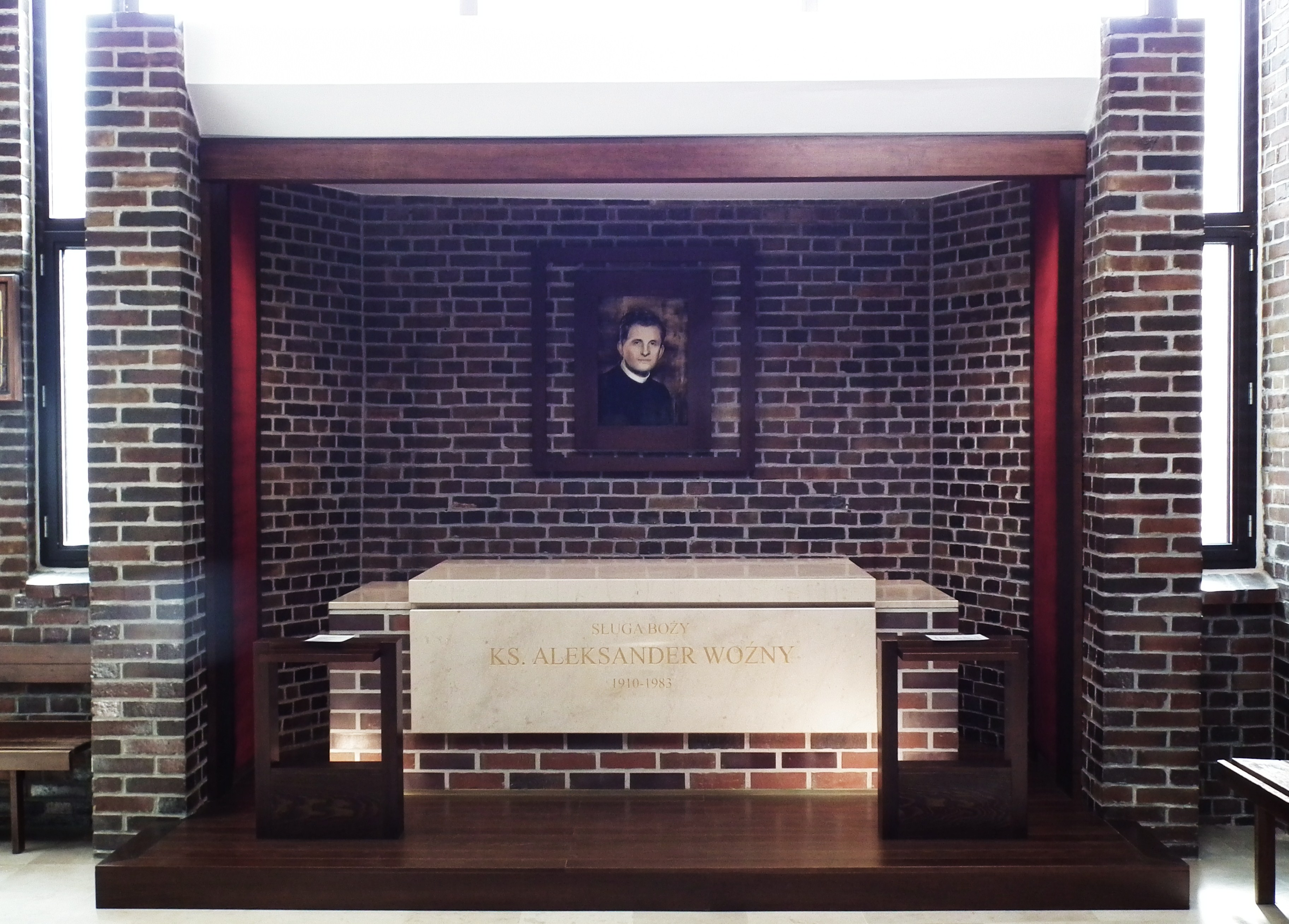 Kościół św. Jana Kantego w Poznaniu - Grunwald.